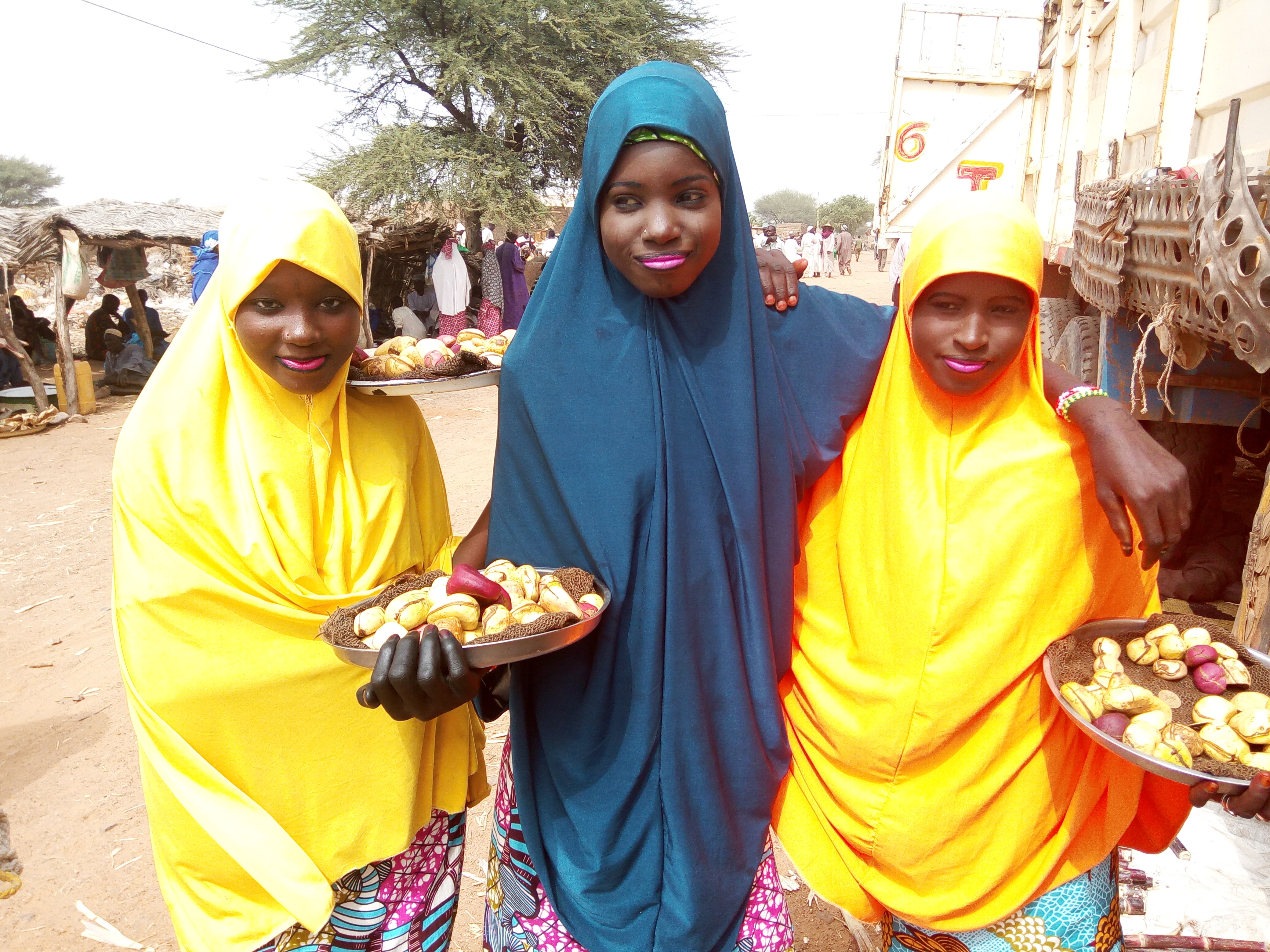 C'est une photo des jeunes filles vendeuses de la kola du village de Kassama (Région de Zinder en république du Niger). Elle montre à travers le maquillage et les l'accoutriment de ces jeunes filles combien est le jour du marché est important dans la tradition nigérienne This is an image from Niger